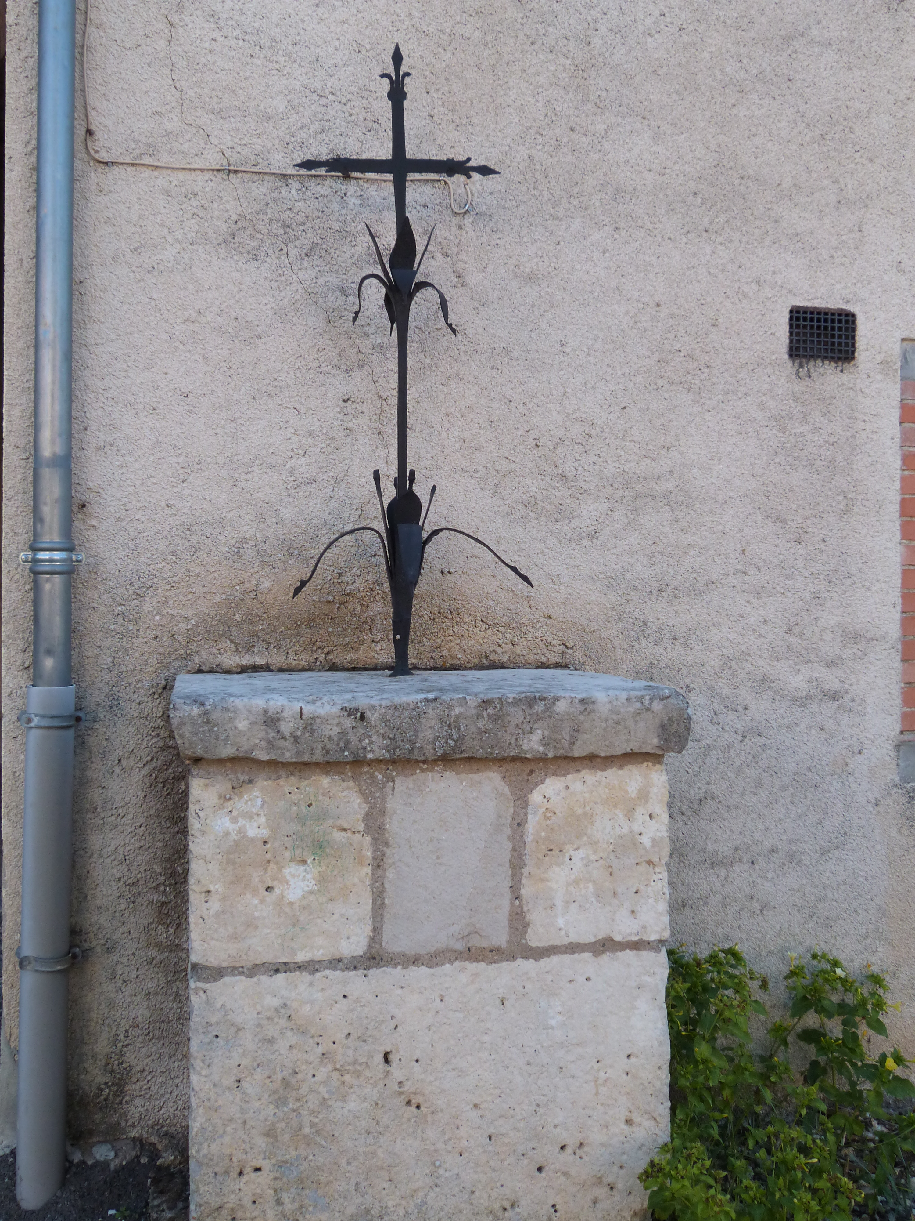 Croix de Bournazel (Classé) .